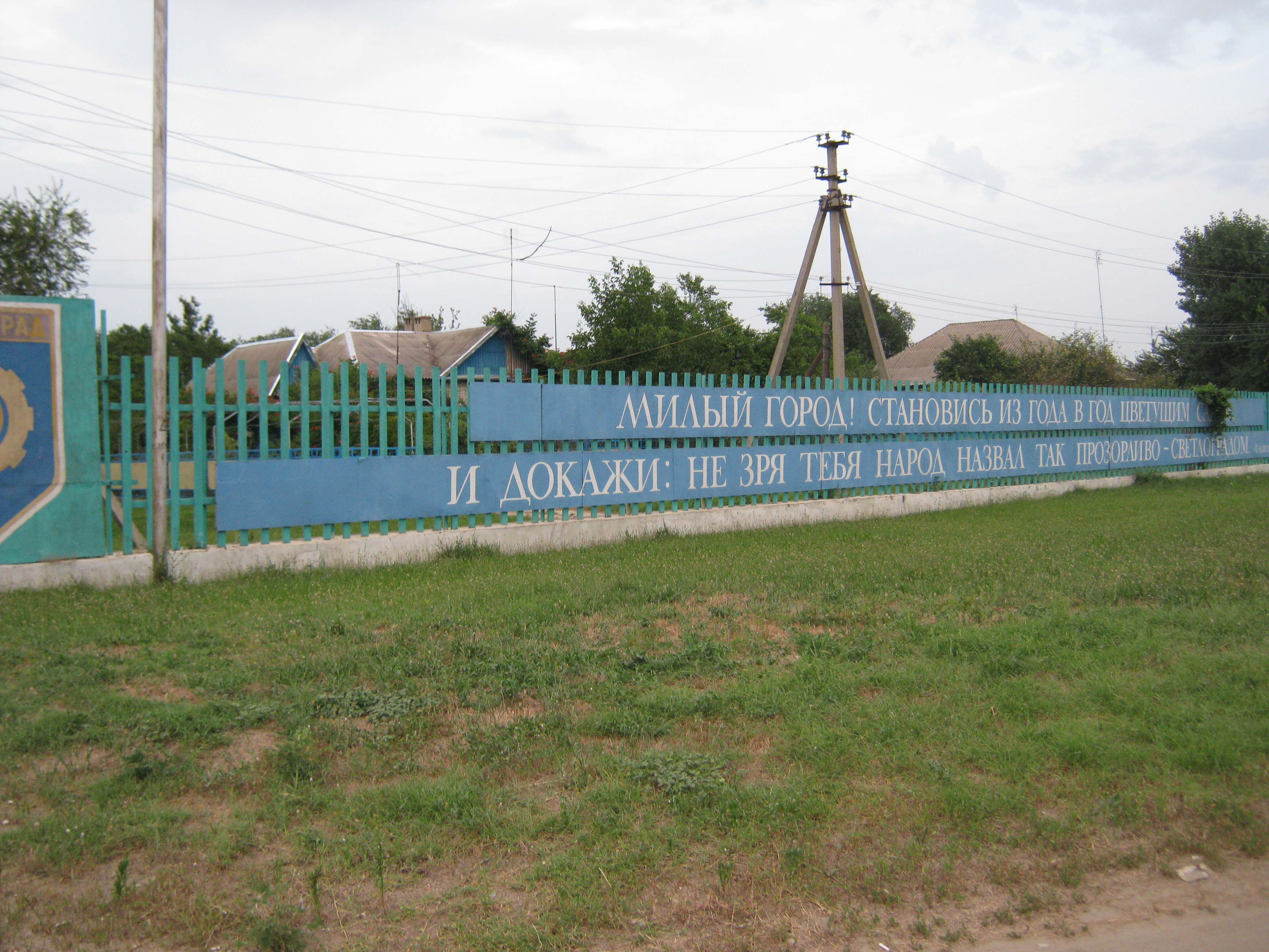 Увеуовеченные строки Фазу Алиевой о городе